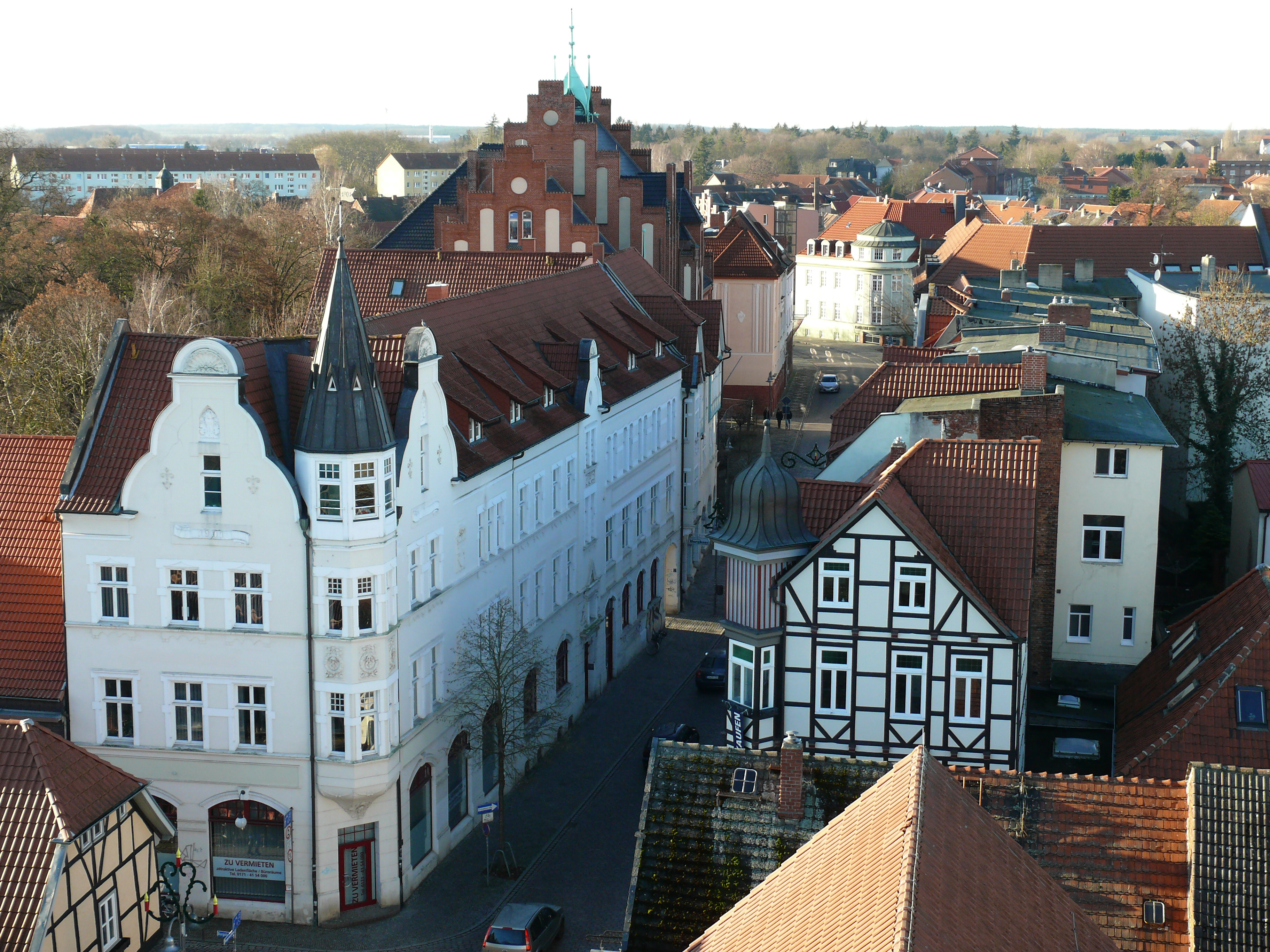 Blick von Rathausturm der Hansestadt Salzwedel Richtung Westen, entlang der Neuperver Straße.